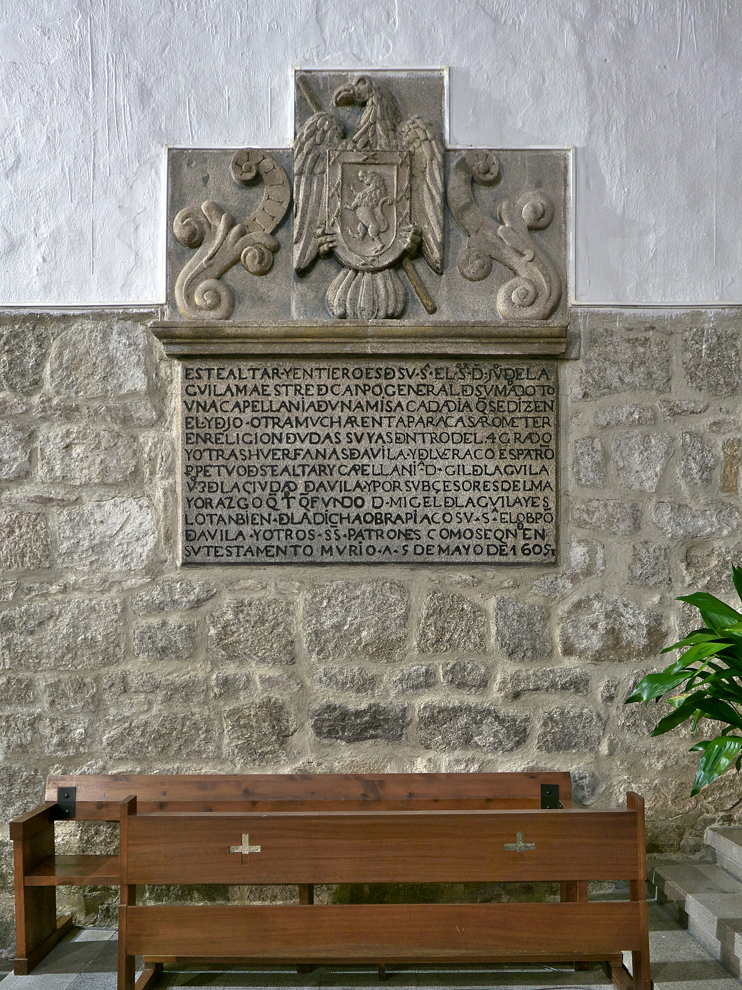 Iglesia de Nuestra Señora de la Asunción, El Barraco. Lápida sepulcral de Juan del Águila y Arellano (†1605)